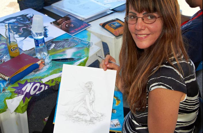 Arantza Sestayo en Cavacon (Italia)